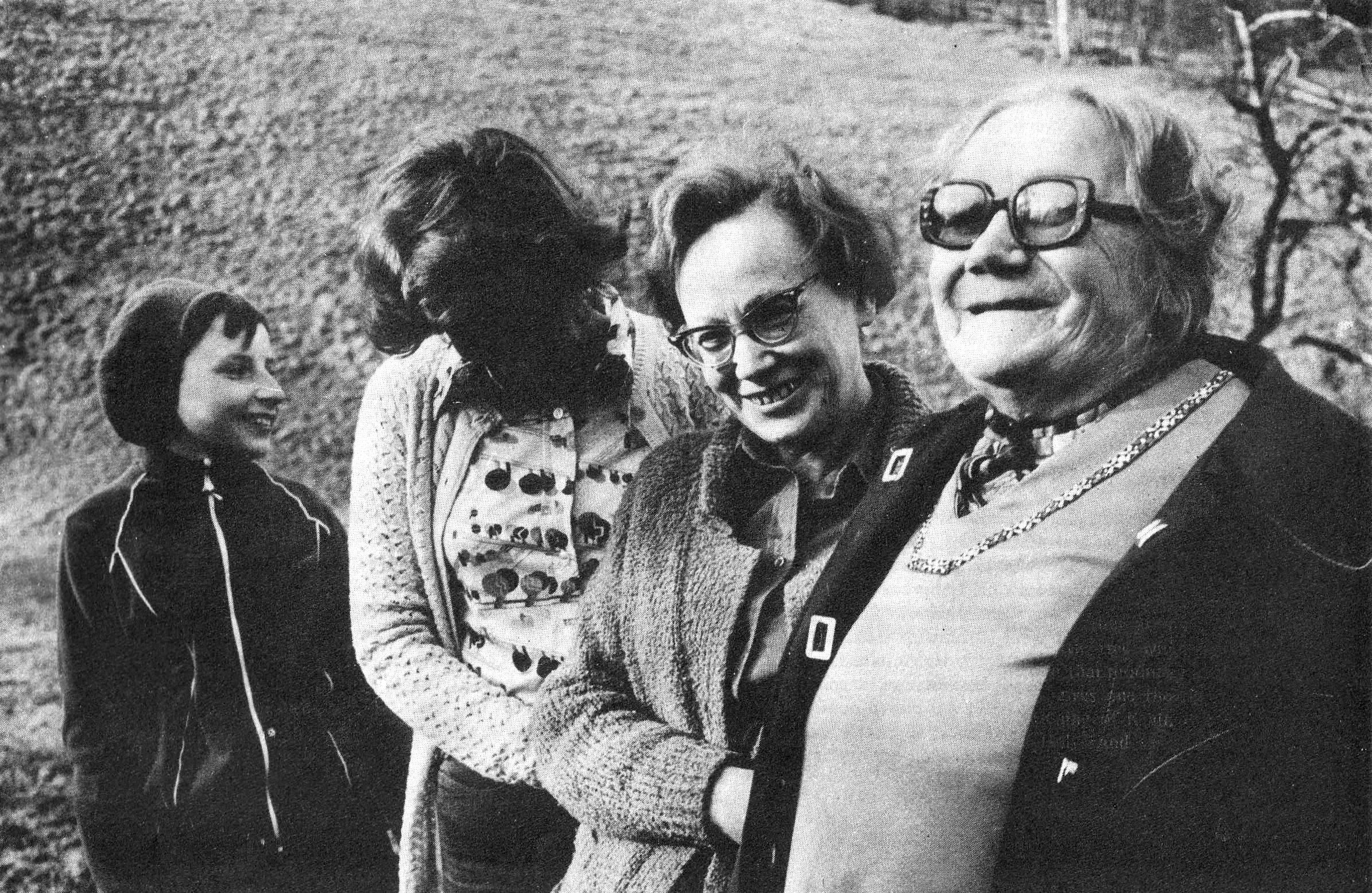 (od prawej) Stefania Tyryłło z córką Stanisławą Pawłowską-Tyryłło, Sprawiedliwe Wśród Narodów Świata